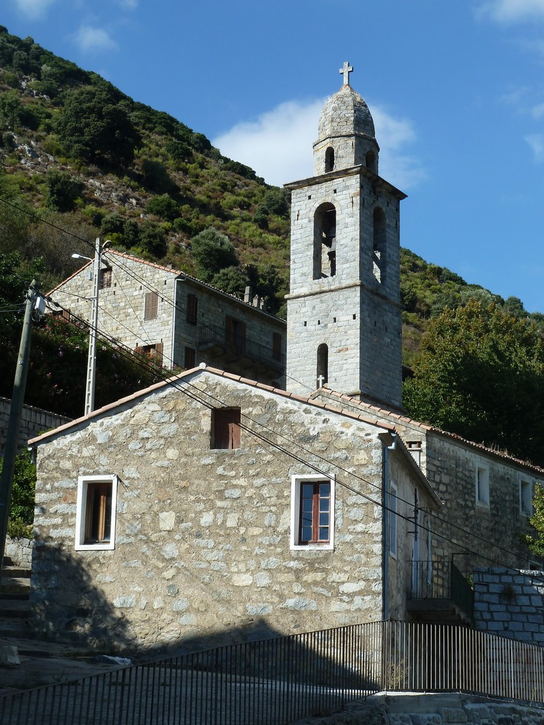 Eglise de Cargiaca